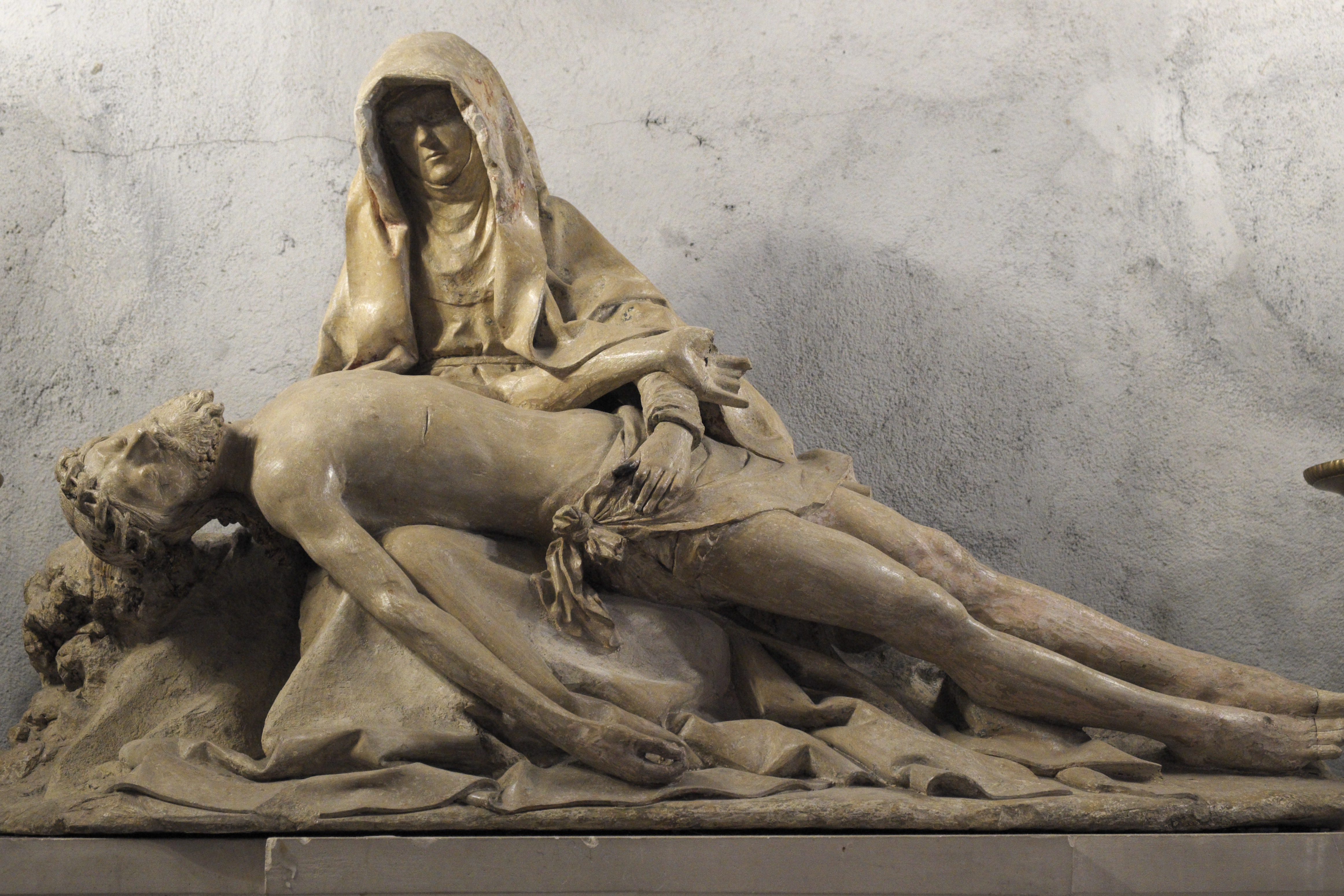 Katholische Pfarrkirche Saint-Hippolyte in Jaligny-sur-Besbre im Département Allier (Auvergne-Rhône-Alpes/Frankreich), Pietà aus dem 15. Jahrhundert